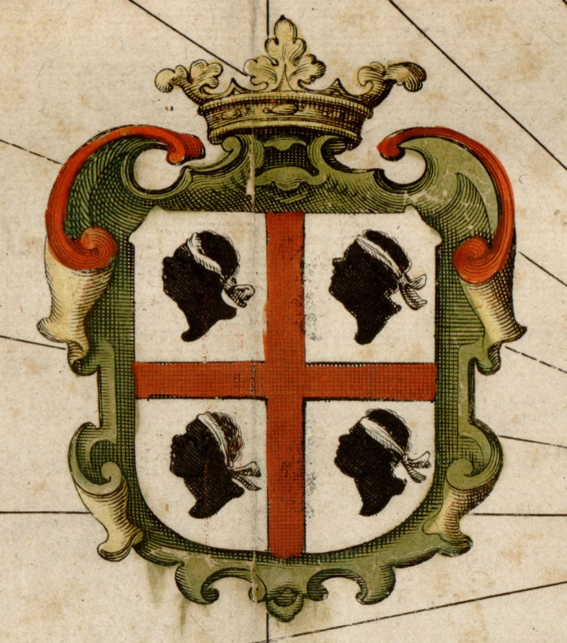 Insulae Sardiniae nova accurata descriptio - Janssonius Johannes, 1642-44